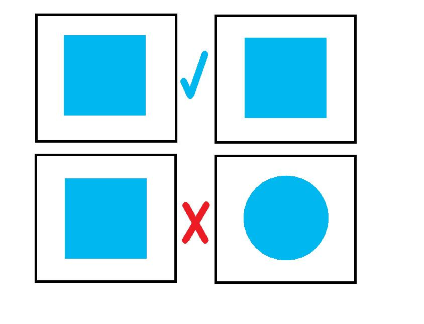 ilustracion de las cartas del juego de memoria